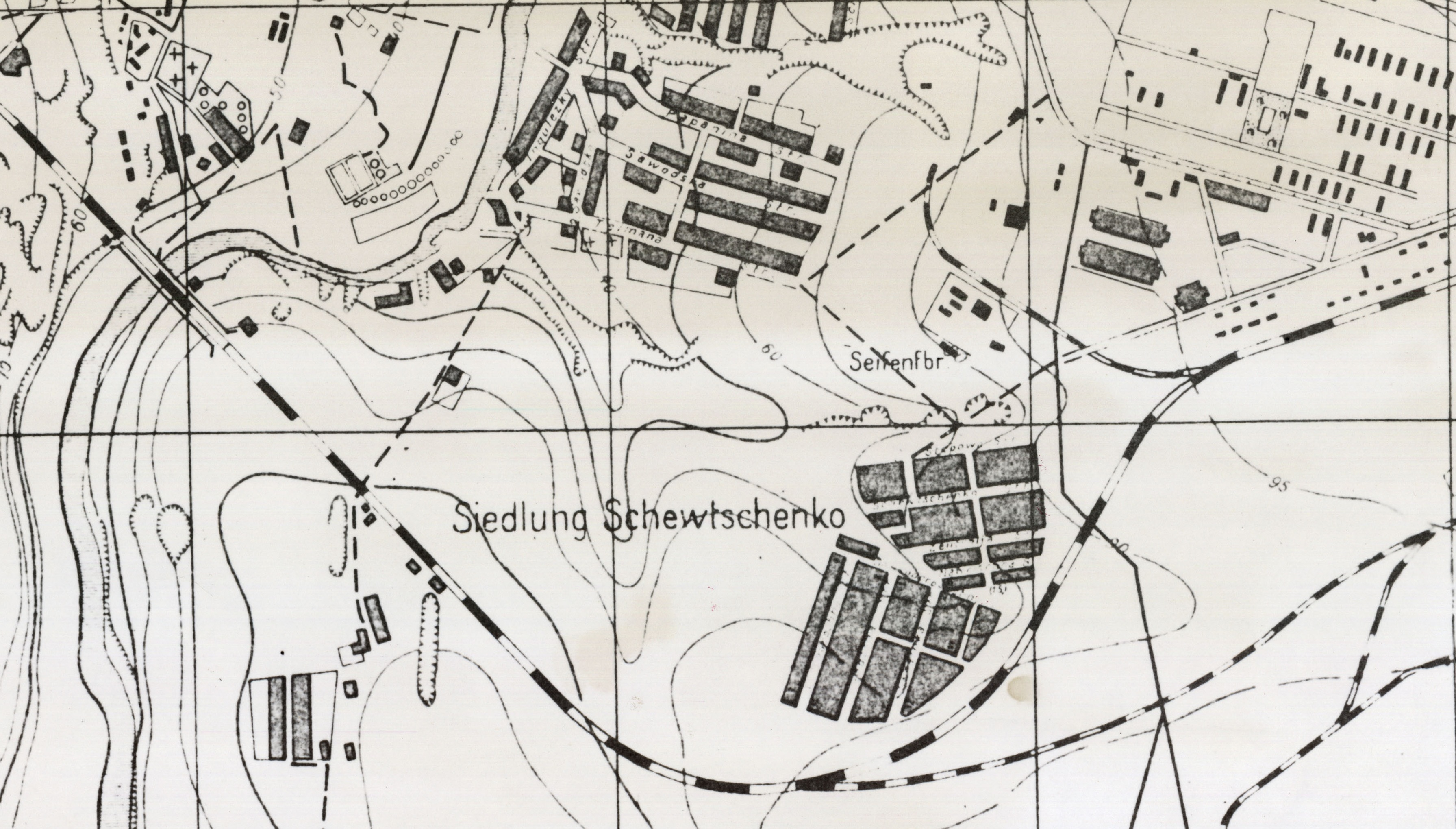 фрагмент плану м. Кривий Ріг часів німецької окупації. В полі огляду фрагменту: р. Інгулець, південь Чорногорки, селище ім. Шевченка (Алахівка)